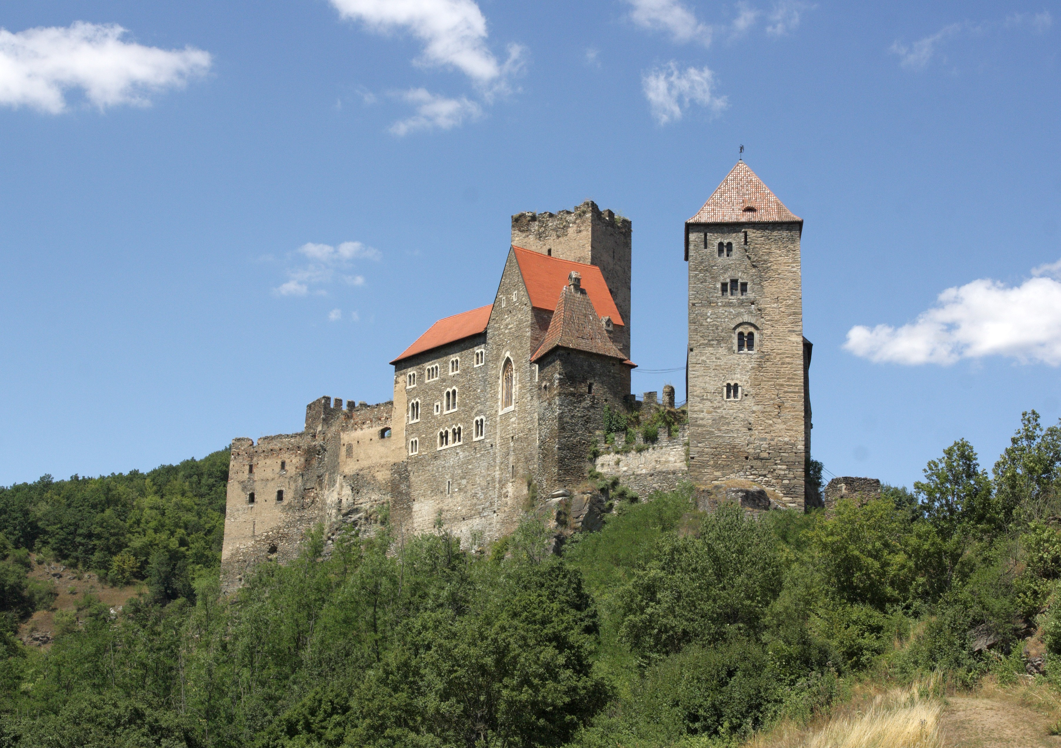 Hardegg - castle Hardegg, southeast view